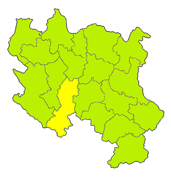 Map of Raška